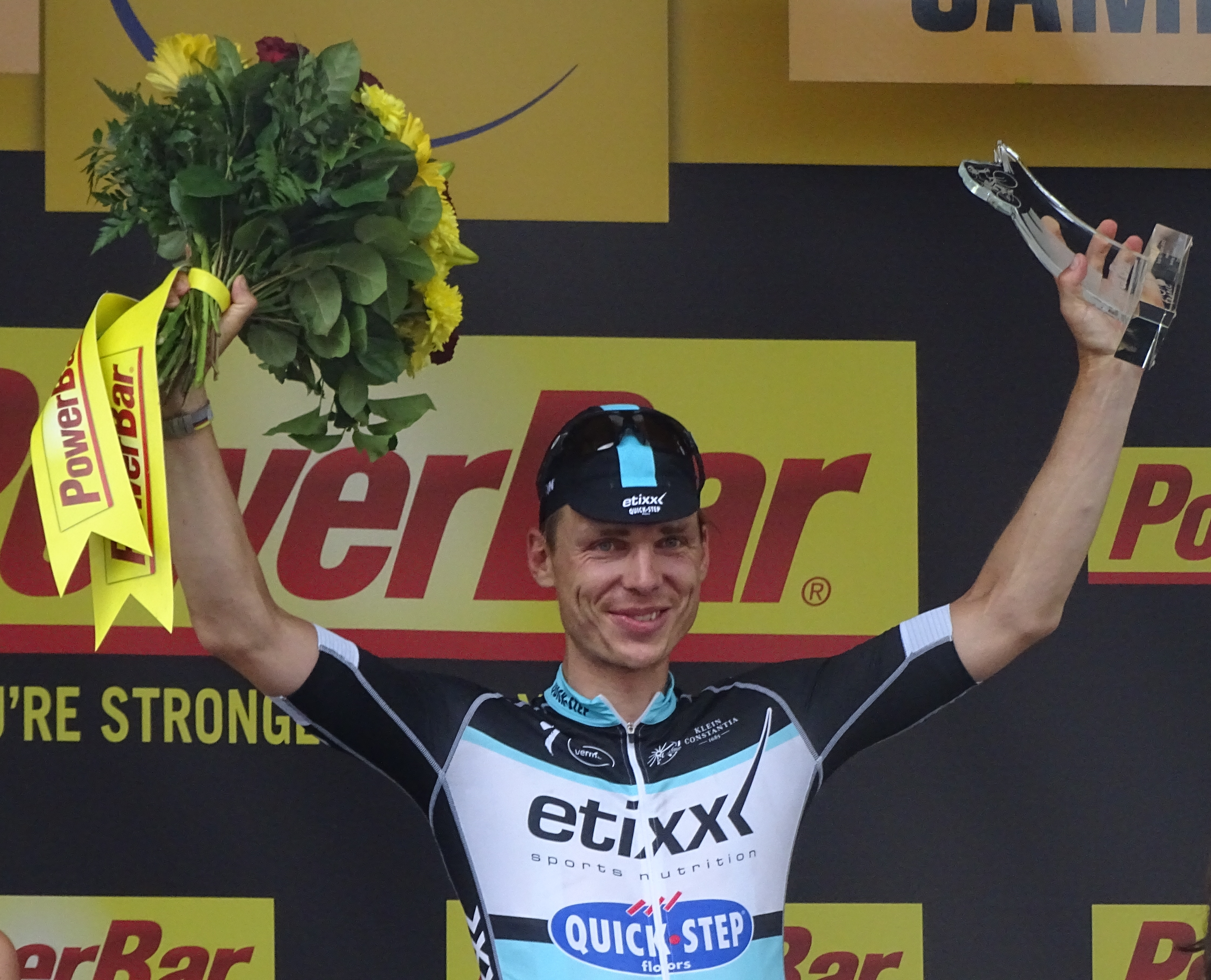 Reportage réalisé le mardi 7 juillet à l'occasion de l'arrivée de la quatrième étape du Tour de France 2015 à Cambrai, Nord-Pas-de-Calais, France.